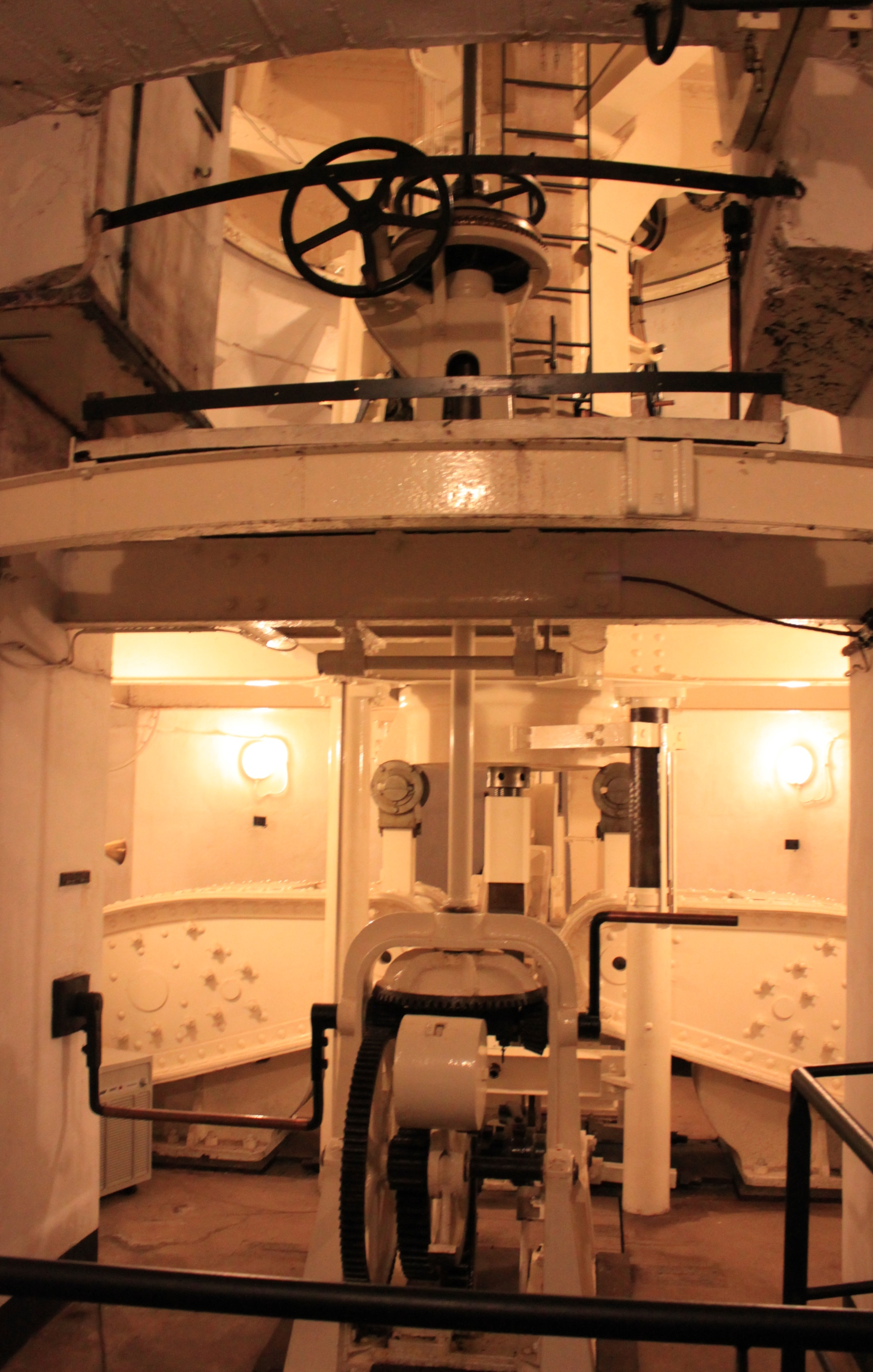 Fort d'Uxegney, Vosges, Lorraine, France